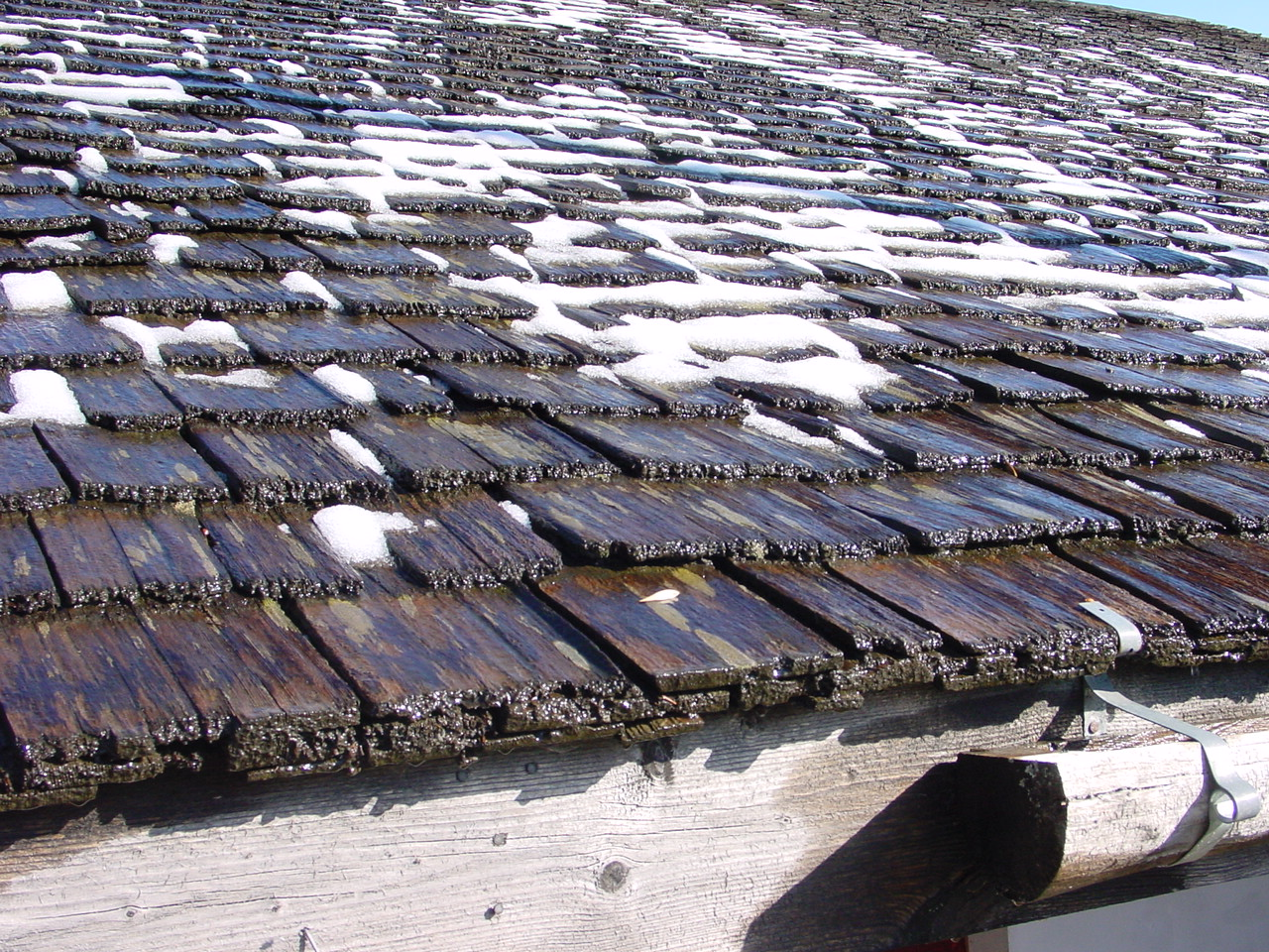 Toit de tavaillons, près d'Abondance (Chablais français) Shingle roof near Abondance (French Chablais)